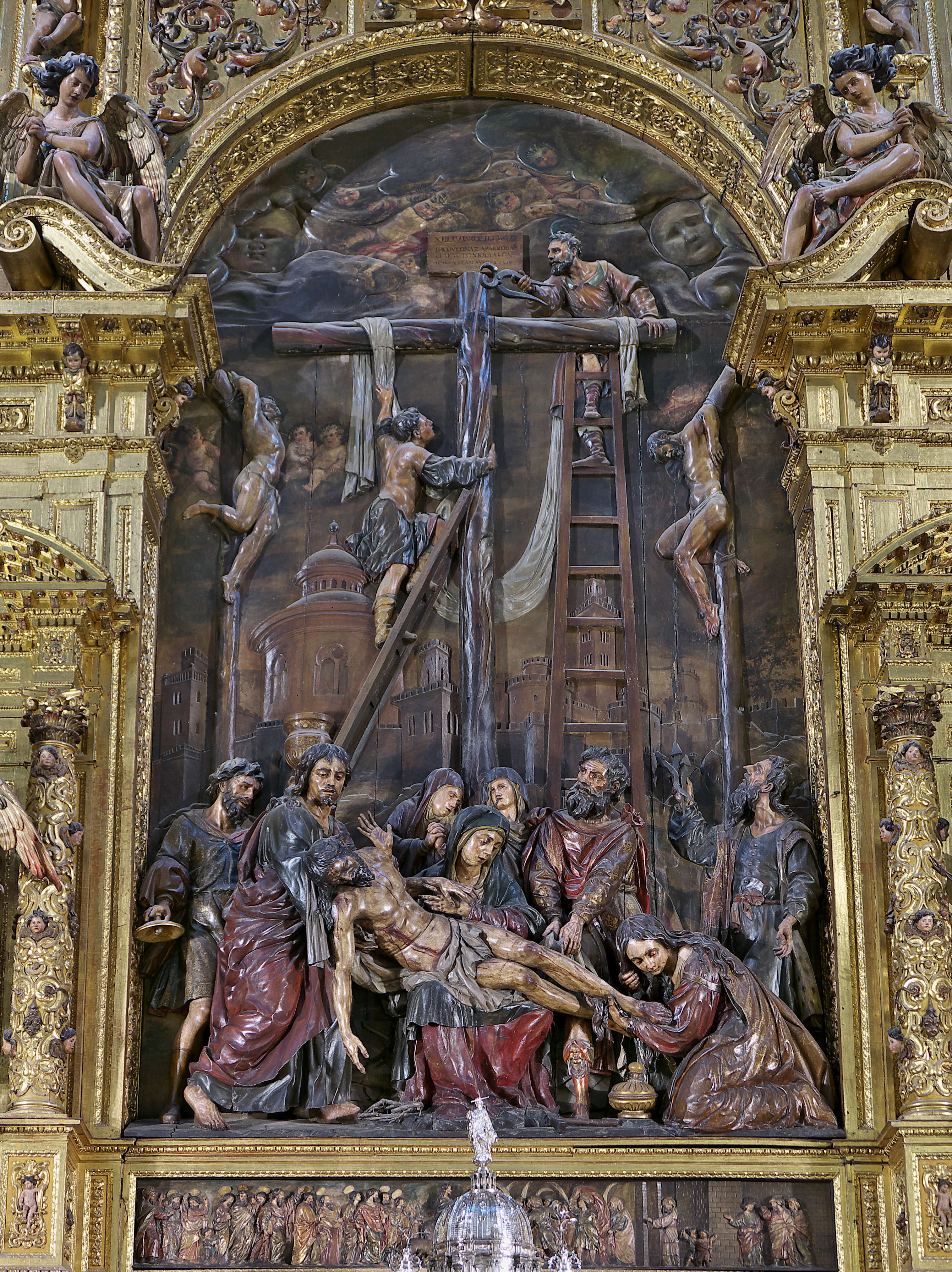 Retablo mayor de la Iglesia del Sagrario (Sevilla). Altorrelieve de Pedro Roldán (1666), procedente del desaparecido Convento Casa Grande de San Francisco (Sevilla).